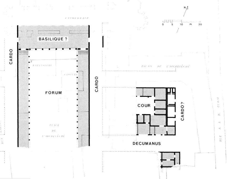 Plan général reconstitué (selon les fouilles de 1984-85) du quartier de l'Archevêché à la fin du 1er siècle de notre ère.